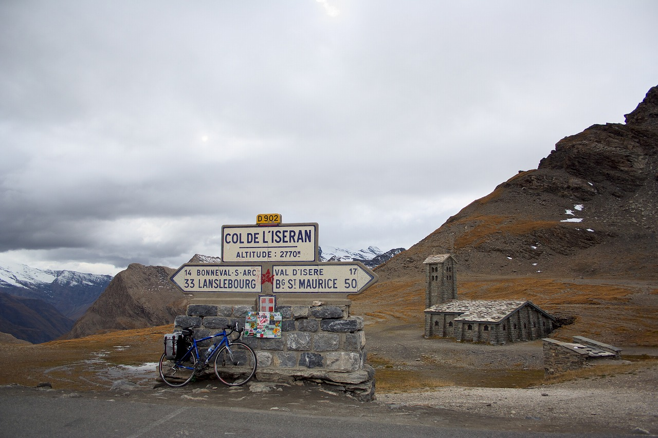 20 Sep. 2009 Modane-Col de l'Iseran(2770m)-Bourg St Maurice